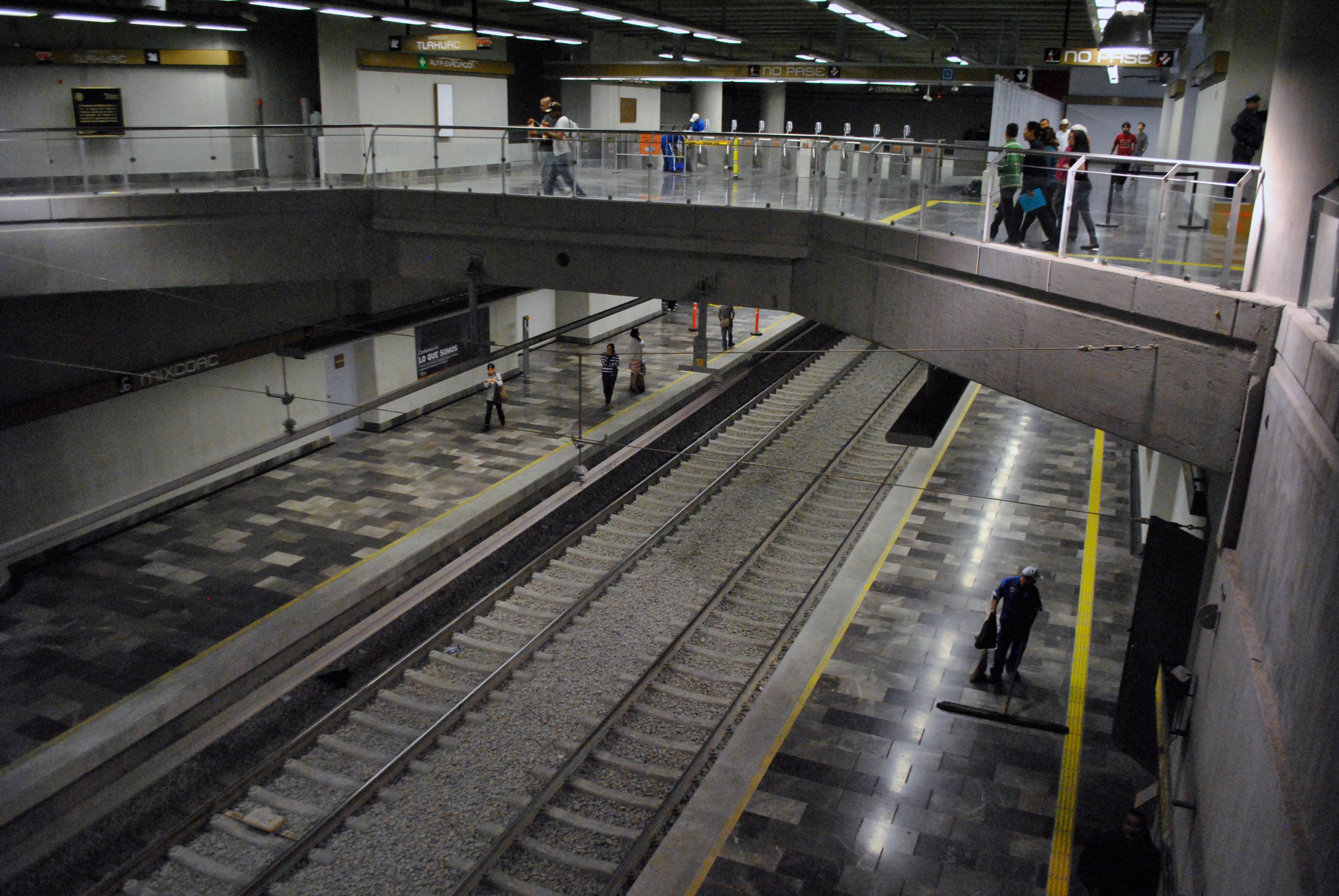 Vista de las vías de la terminal MIxcoac de la Línea 12 del Metro.